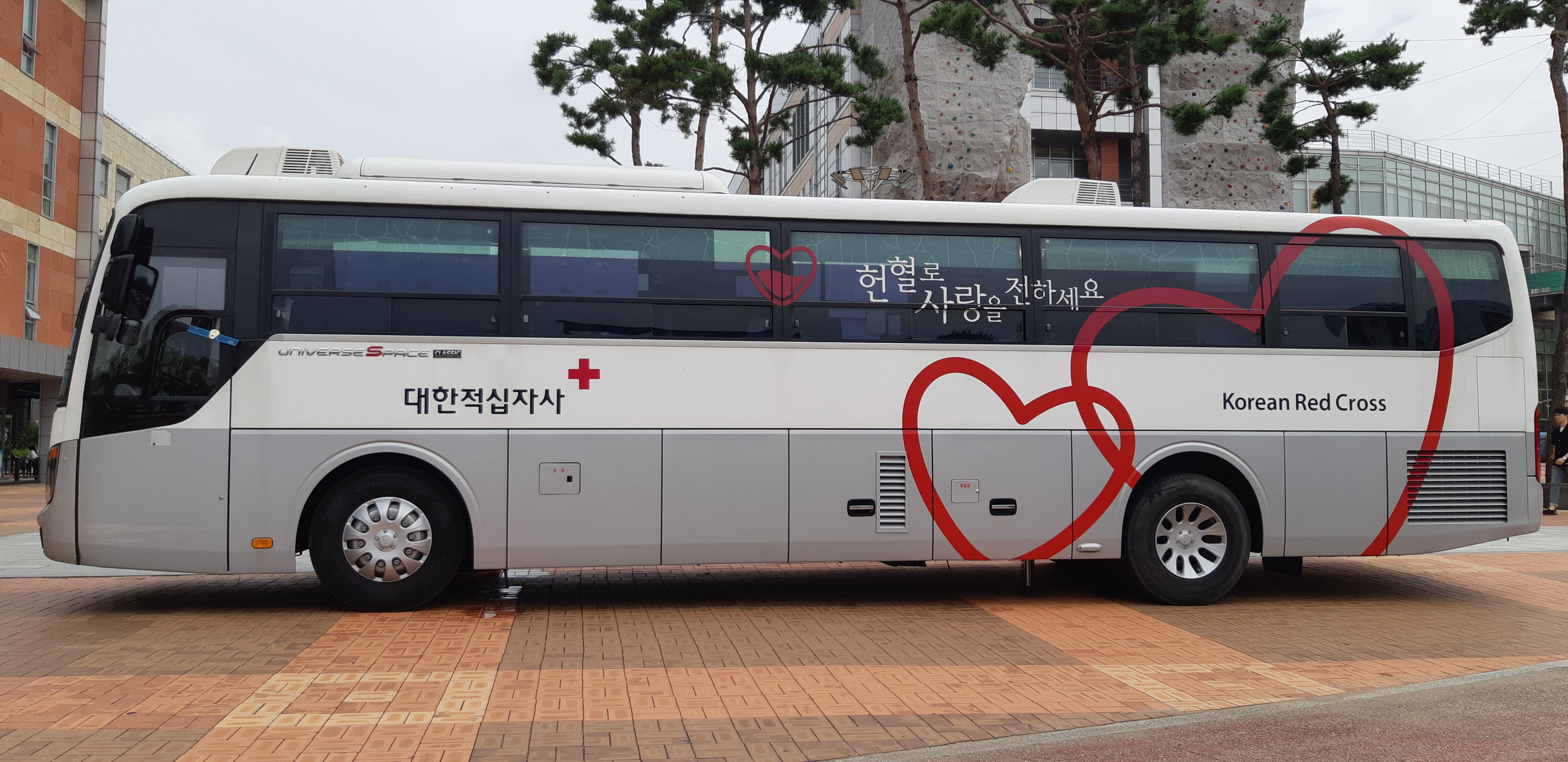 현대 유니버스 헌혈차